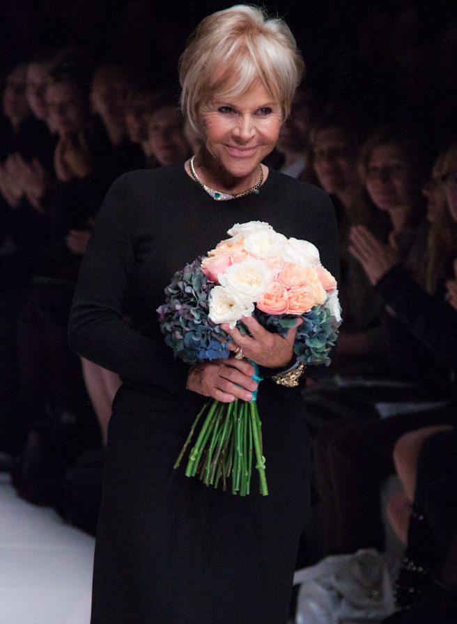 Anna Molinari, co-fondatrice di Blufin.